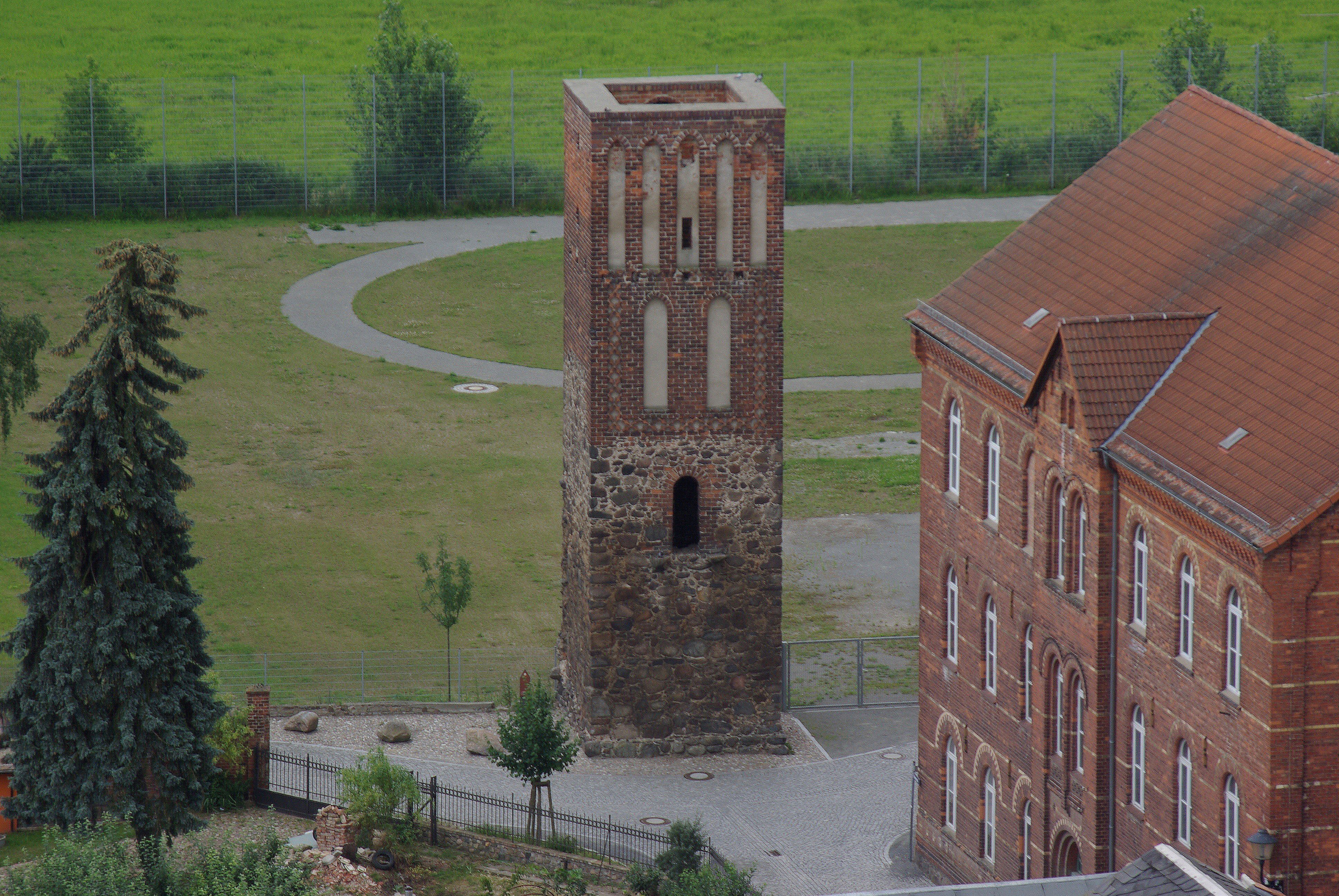 Jüterbog in Brandenburg. Der Turm steht am Ende der Schulstraße, Hinter der Mauer. Der Turm ist Teil der ehemaligen Stadtbefestigung. Die Aufnahme ist von Nicolaikirche gemacht worden.